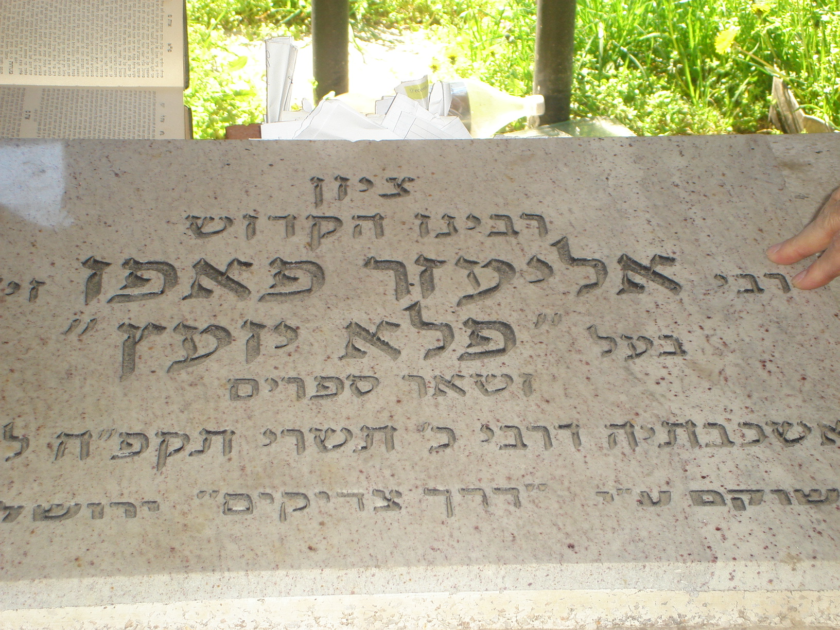 מצבת קברו של ר' אליעזר פאפו בעיר סיליסטרה שבבולגריה